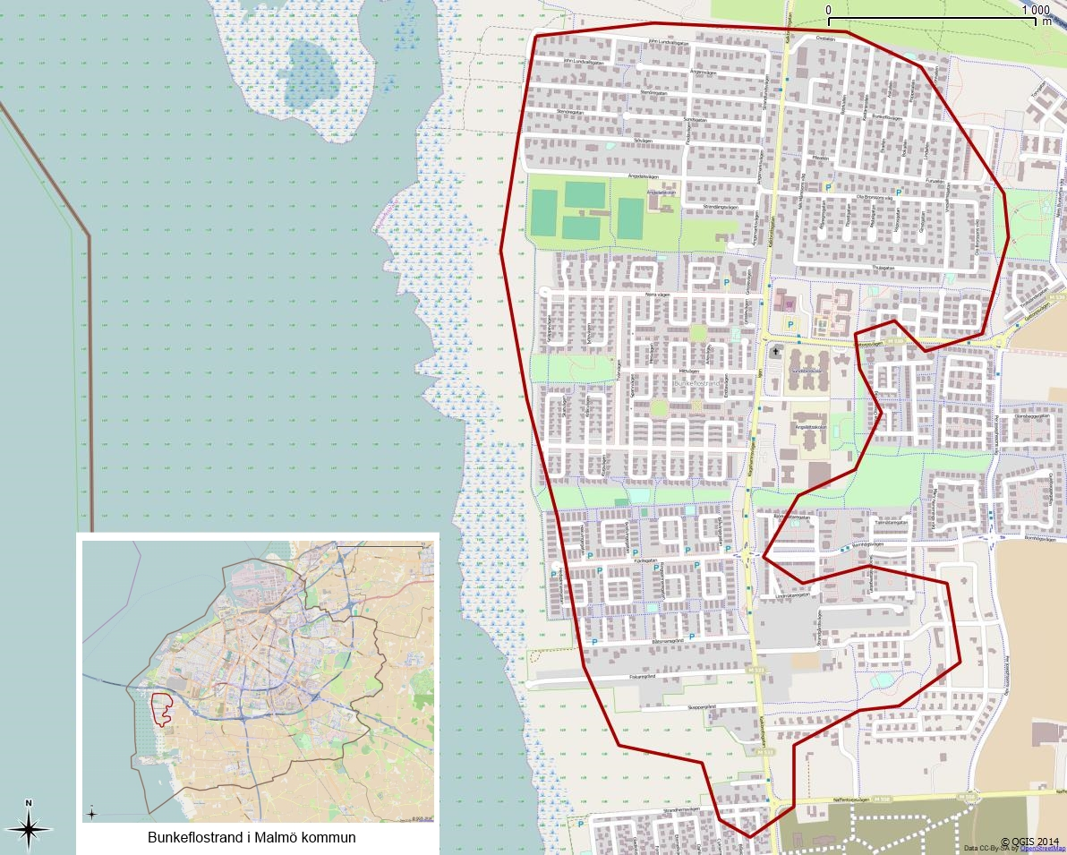 Tätorten Bunkeflostrands gränser 1990 enligt Atlas över rikets indelningar 1992.